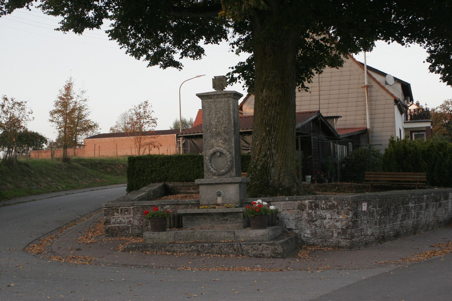 Denkmalgeschütztes Kriegerdenkmal Biedershausen